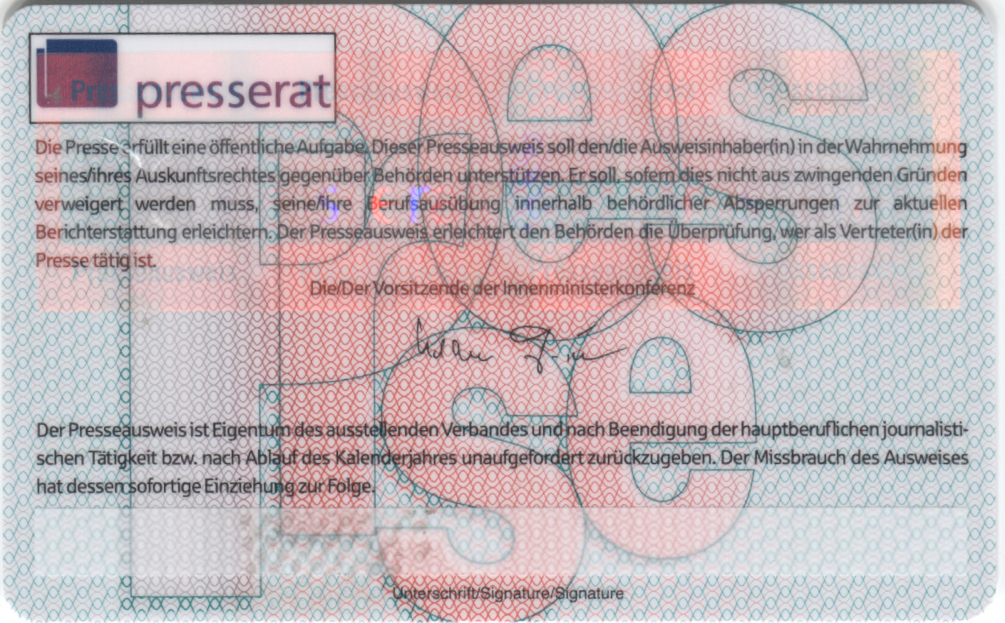 deutscher bundeseinheitlicher Pressseausweis für 2018, ausgegeben von DJV, ver.di/dju, BDZV, VDS, VDZ und freelens